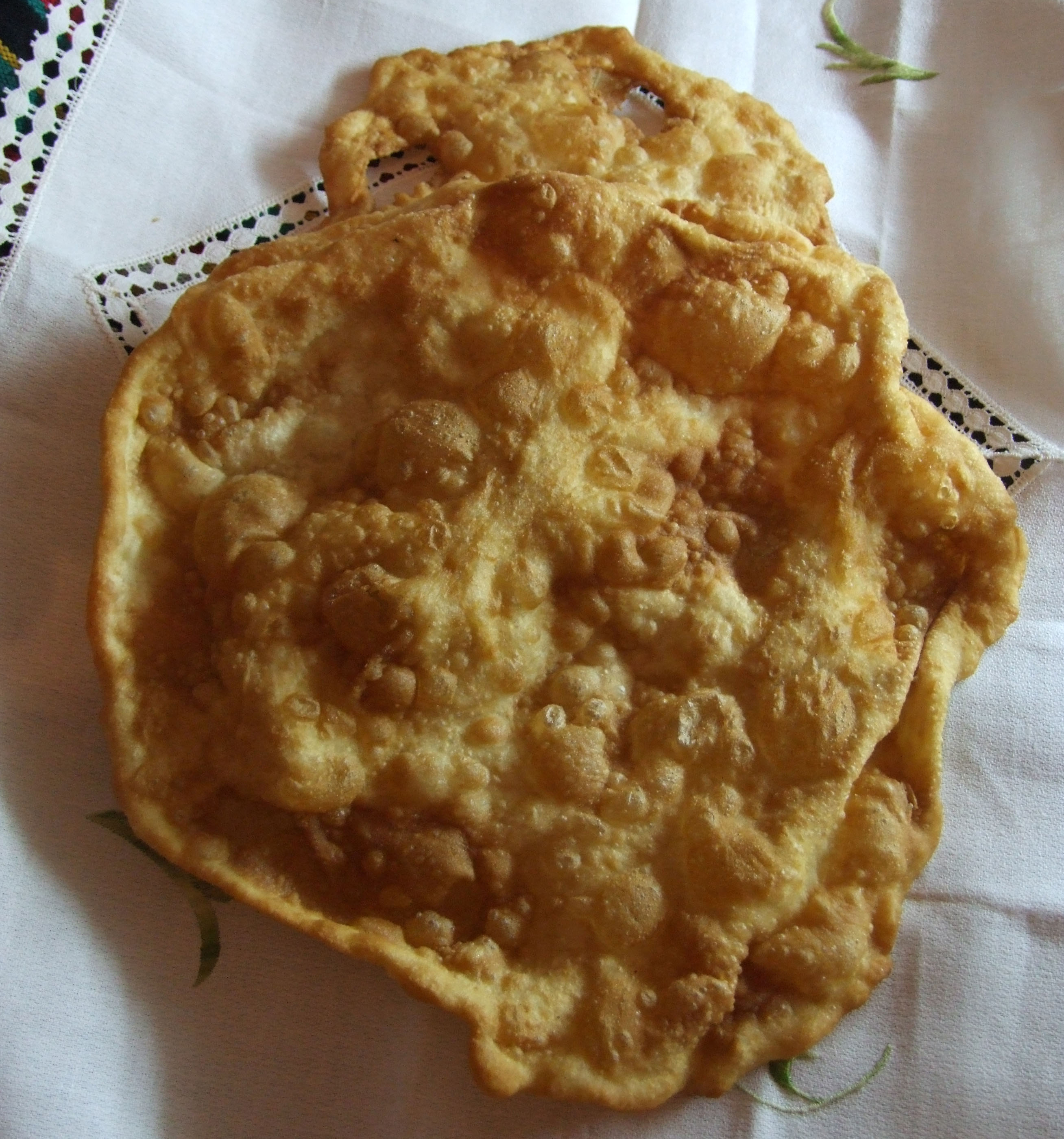 Las Tortillas de Rodilla producto típico de la repostería bolañega